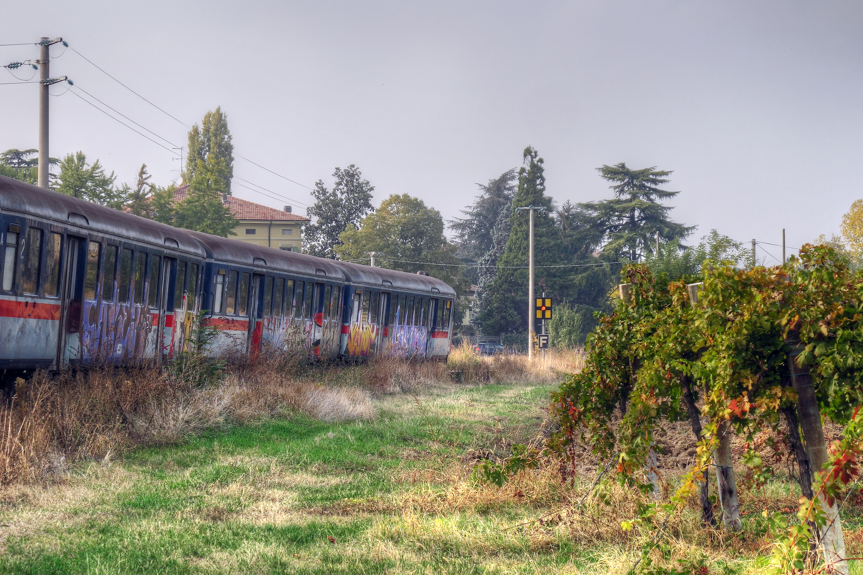 Treno Reggio Sassuolo - Pratissolo, Scandiano (RE) Italia - 31 Ottobre 2011